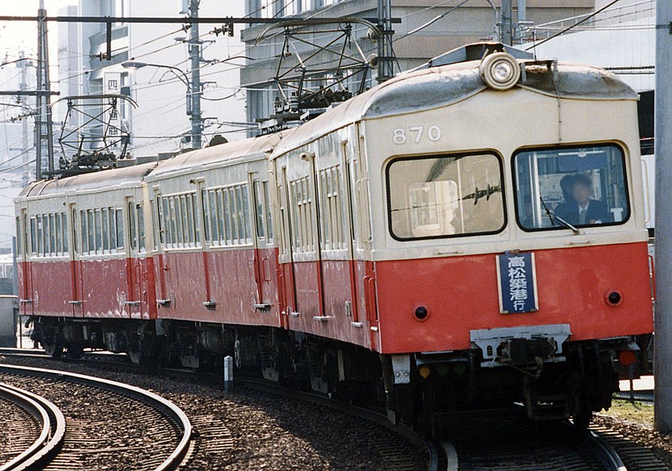 高松琴平電鉄 860形 870